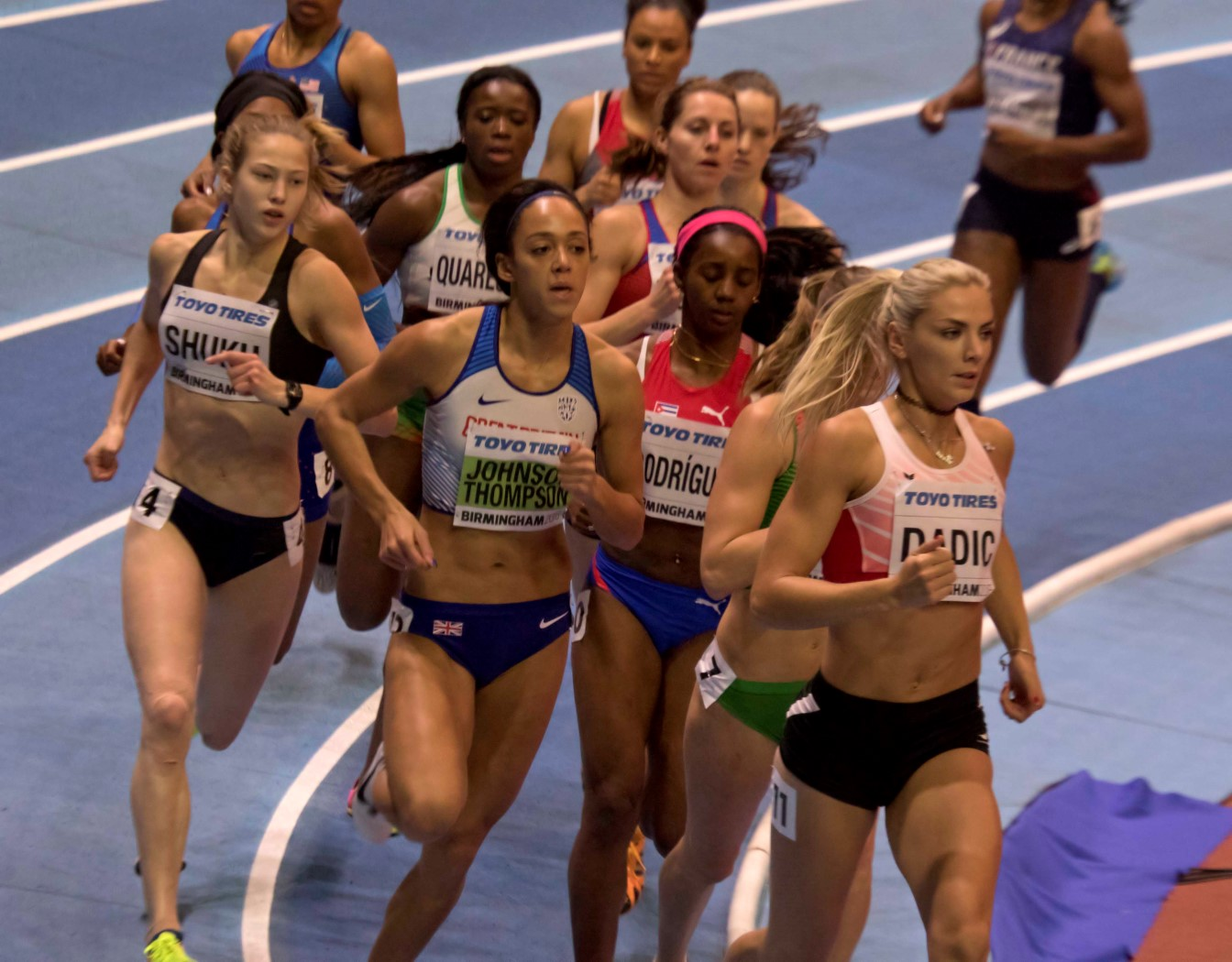 WK2B0110 800m vijfkamp